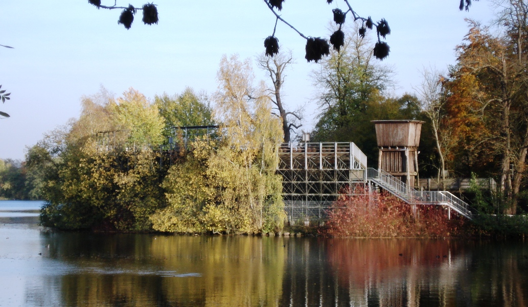 Die Bühne der Eutiner Festspiele am Großen Eutiner See